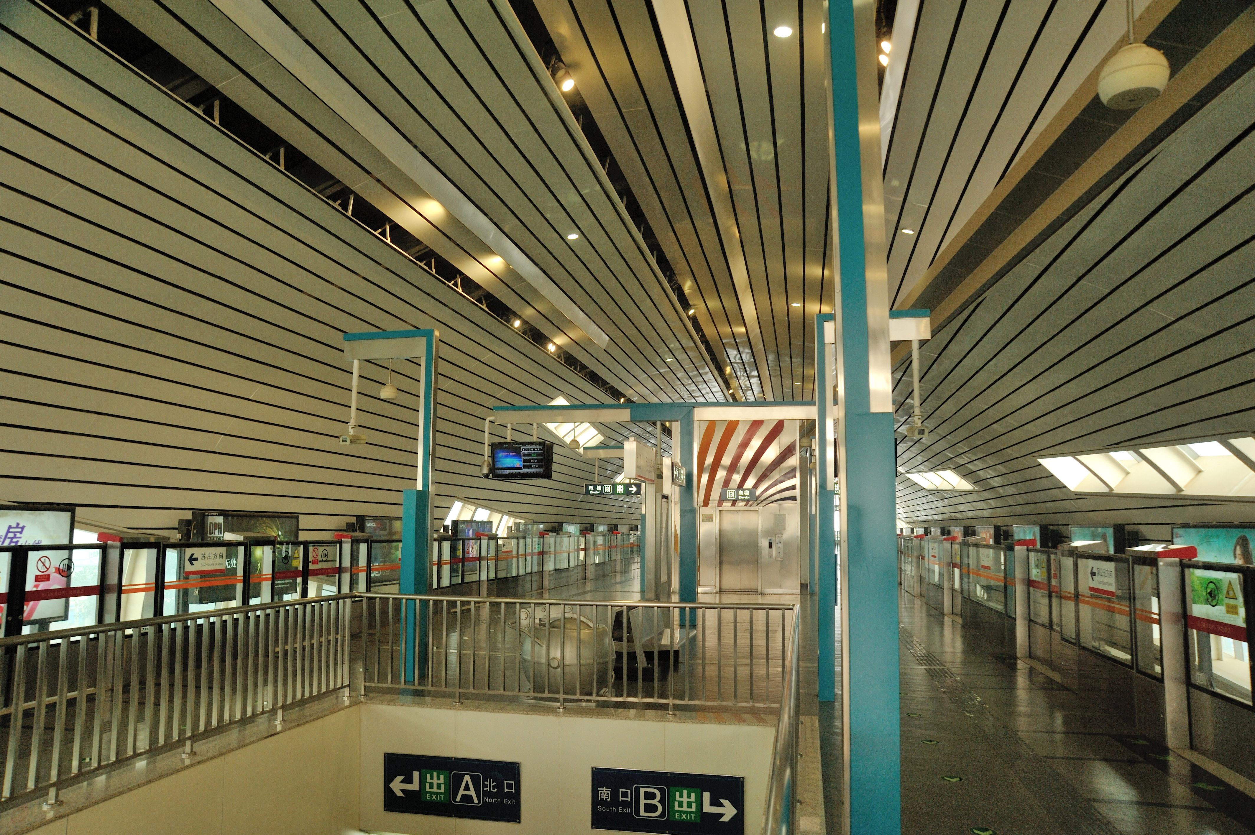 长阳站站台